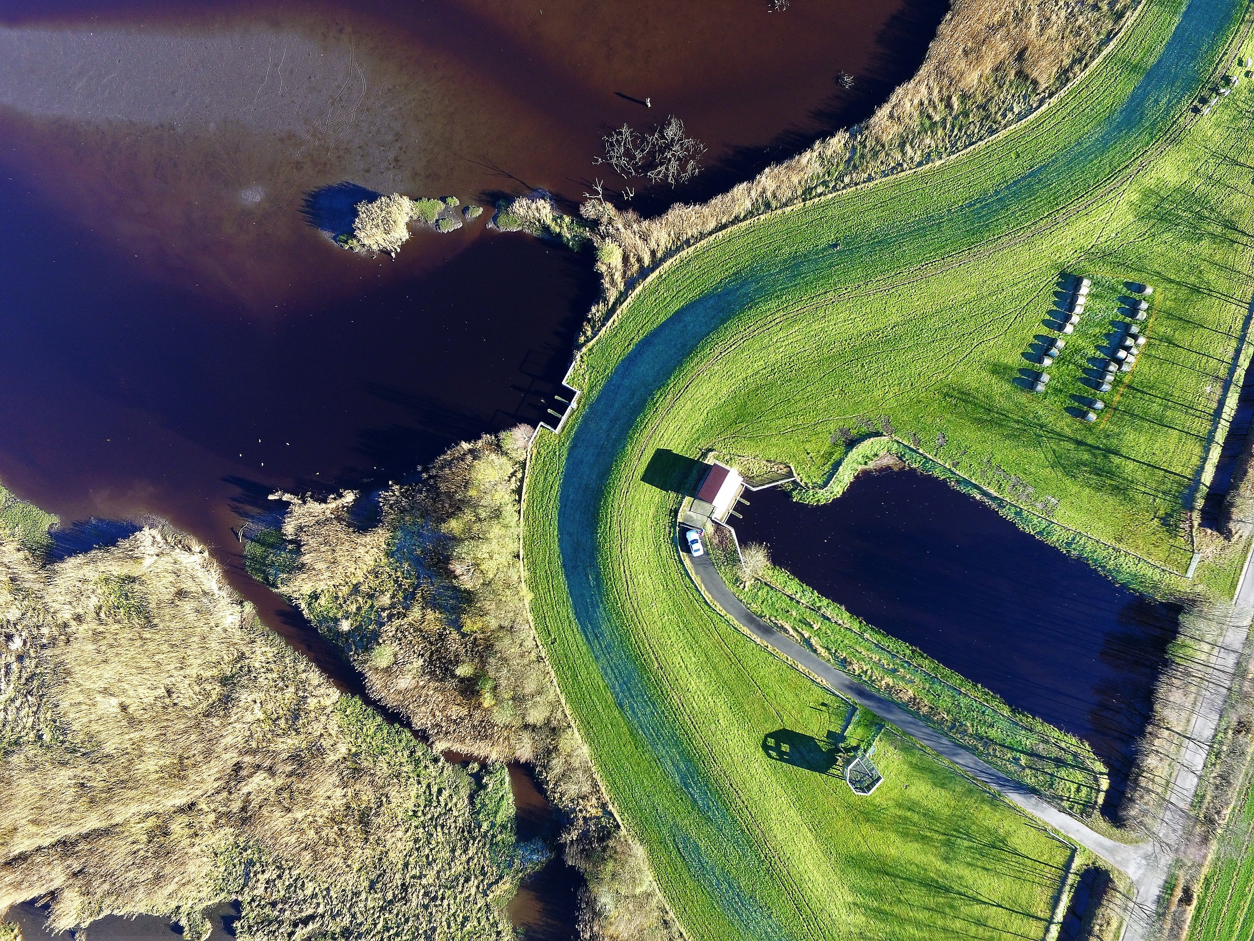 Naturschutzgebiet „Aper Tief“ (NSG WE 221) in Apen – Die Aufnahme entstand im Ausdeichungsgebiet bei Hengstforderfeld am Deich unmittelbar an der Straße „Unterster Weg“ in der Nähe der Abzweigung „Turmstraße“. Die exakten Koordinaten für das Foto lauten 53°12'39.5"N 7°46'16.1"E.